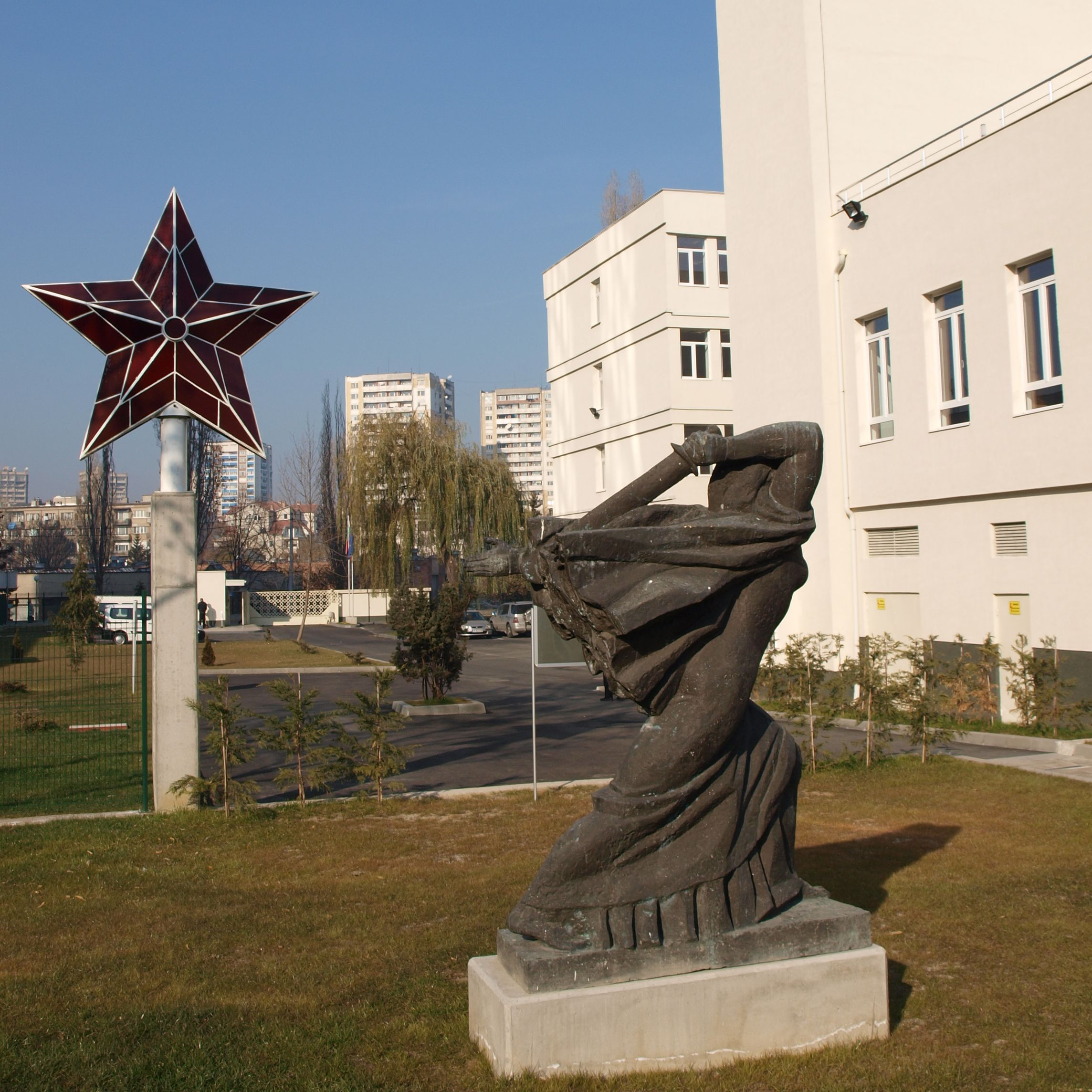 Входа в парка на Музея на социалистическото изкуство в София с Оригиналната червена петолъчка - символ на социализма и комунизма в Народна Република България (1944 - 1989), която от 1956 до 1984 година се извисява над Партийния дом в центъра на София.